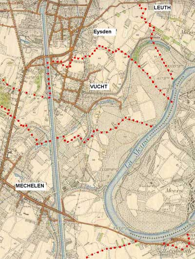 De gemeente Maasmechelen in 1935, nog zonder de cités van de mijn.